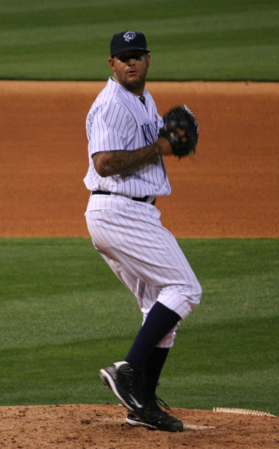 Erick Threets